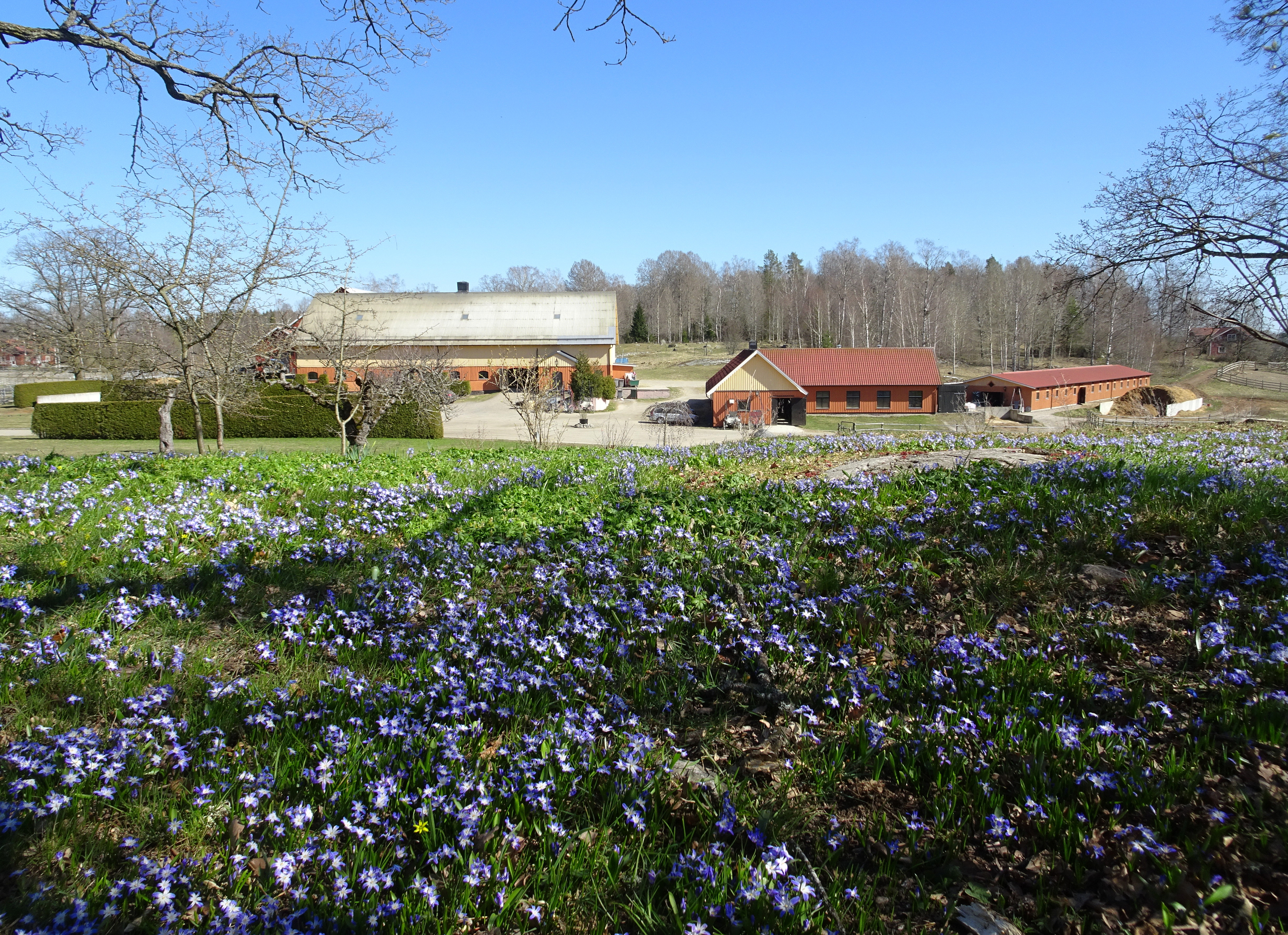 Jordanstorps säteri, stall